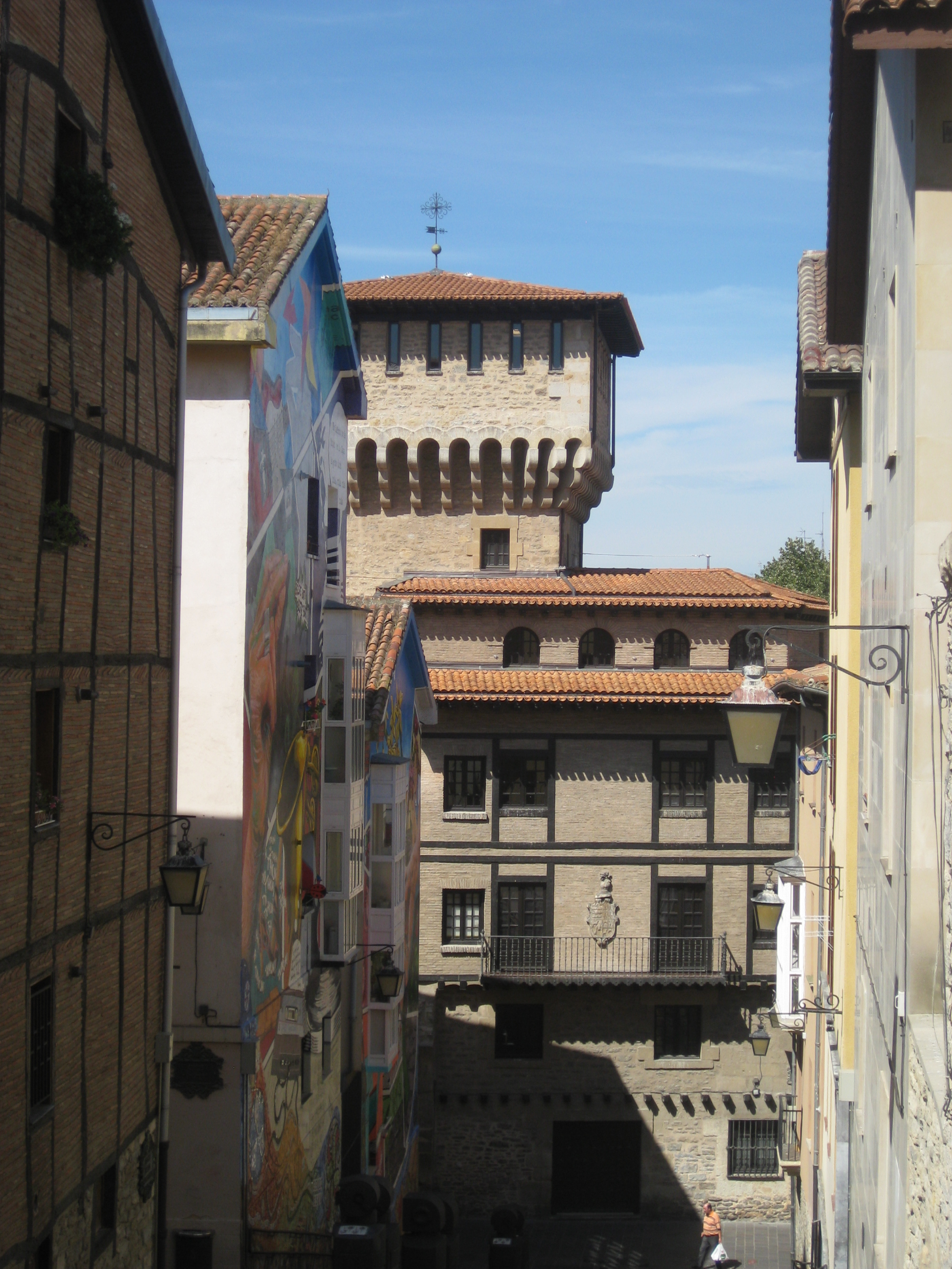 Cantón de Carnicerías en el casco medieval. Al fondo, la torre de Doña Ochanda.